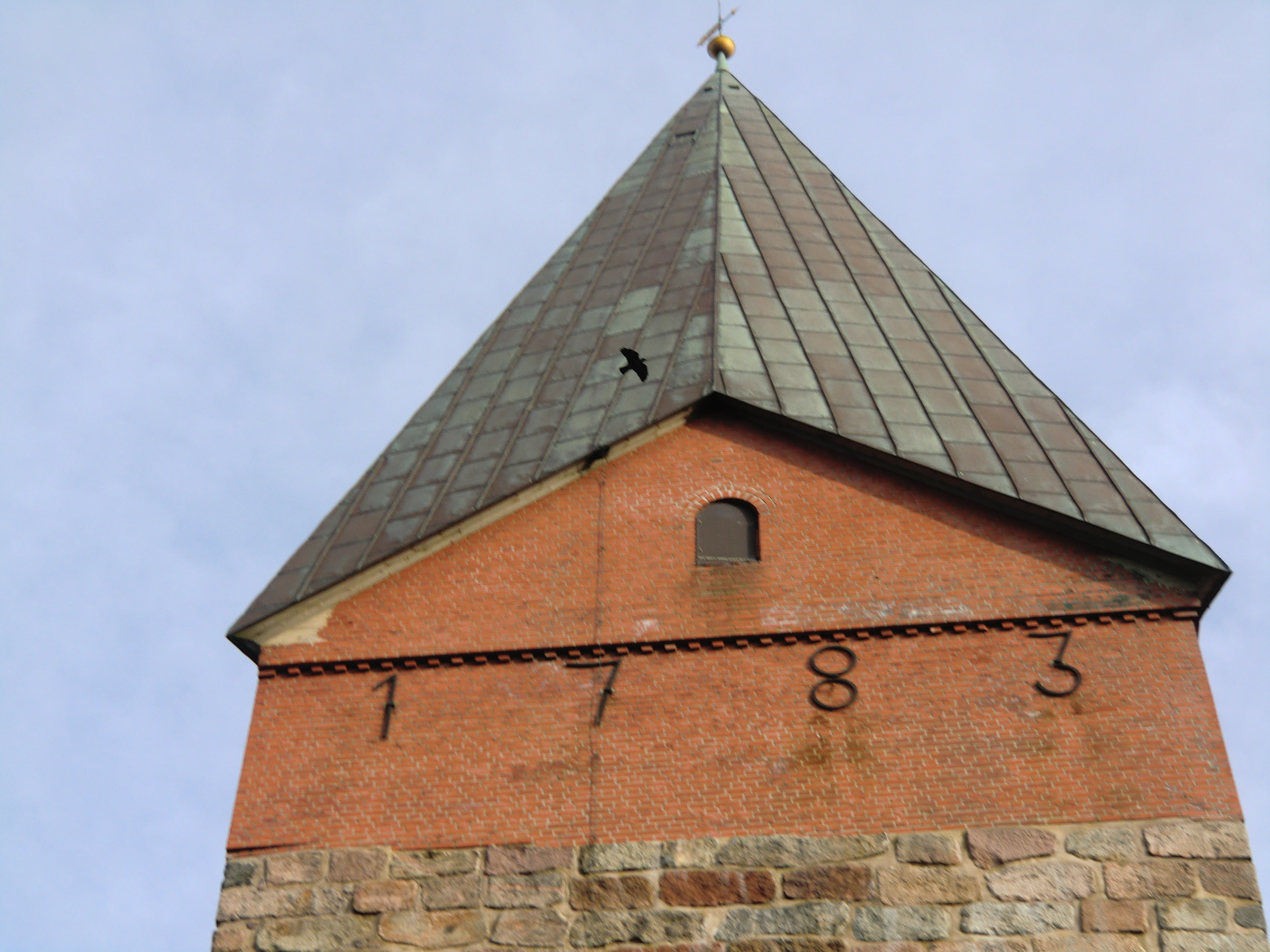 Kirchturm